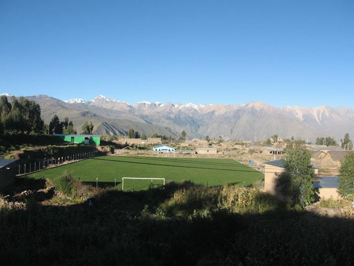 Panoramica del Estadio Municipal de Andagua